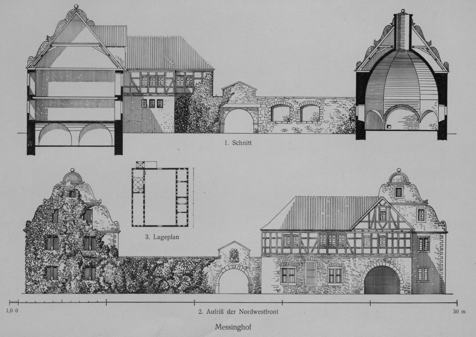 Auf- und Grundriss des Messinghofes in Kassel. Erstellt von Alois Holtmeyer (1872 - 1931) Tafel 360 des o.g. Werks.